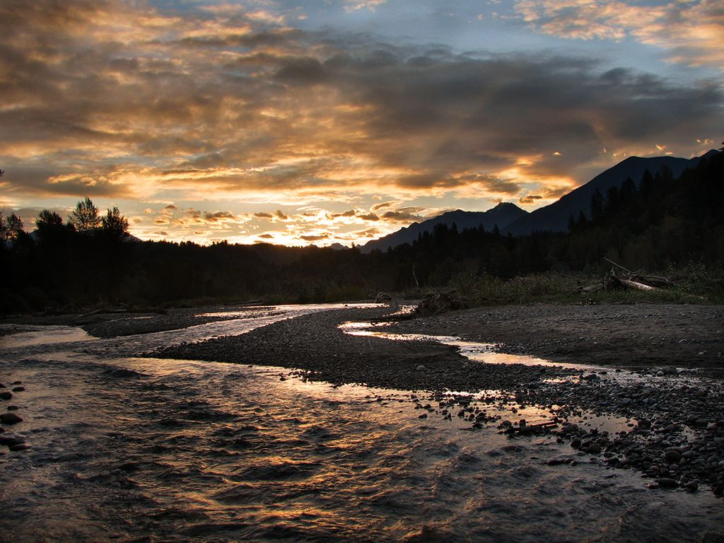 Vedder River at dawn, Stephen Edwards